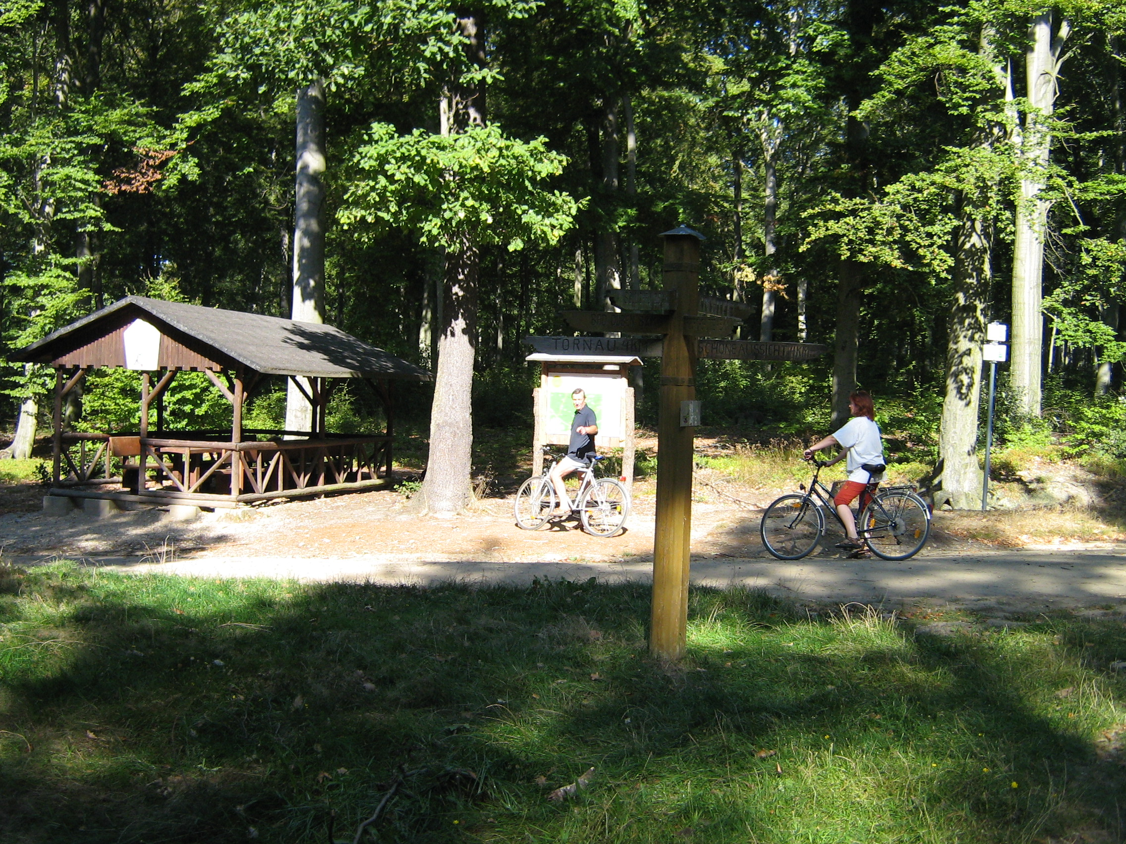 Der Wegweiser Siebenarmsäule bei Tornau in der Dübener Heide own Work